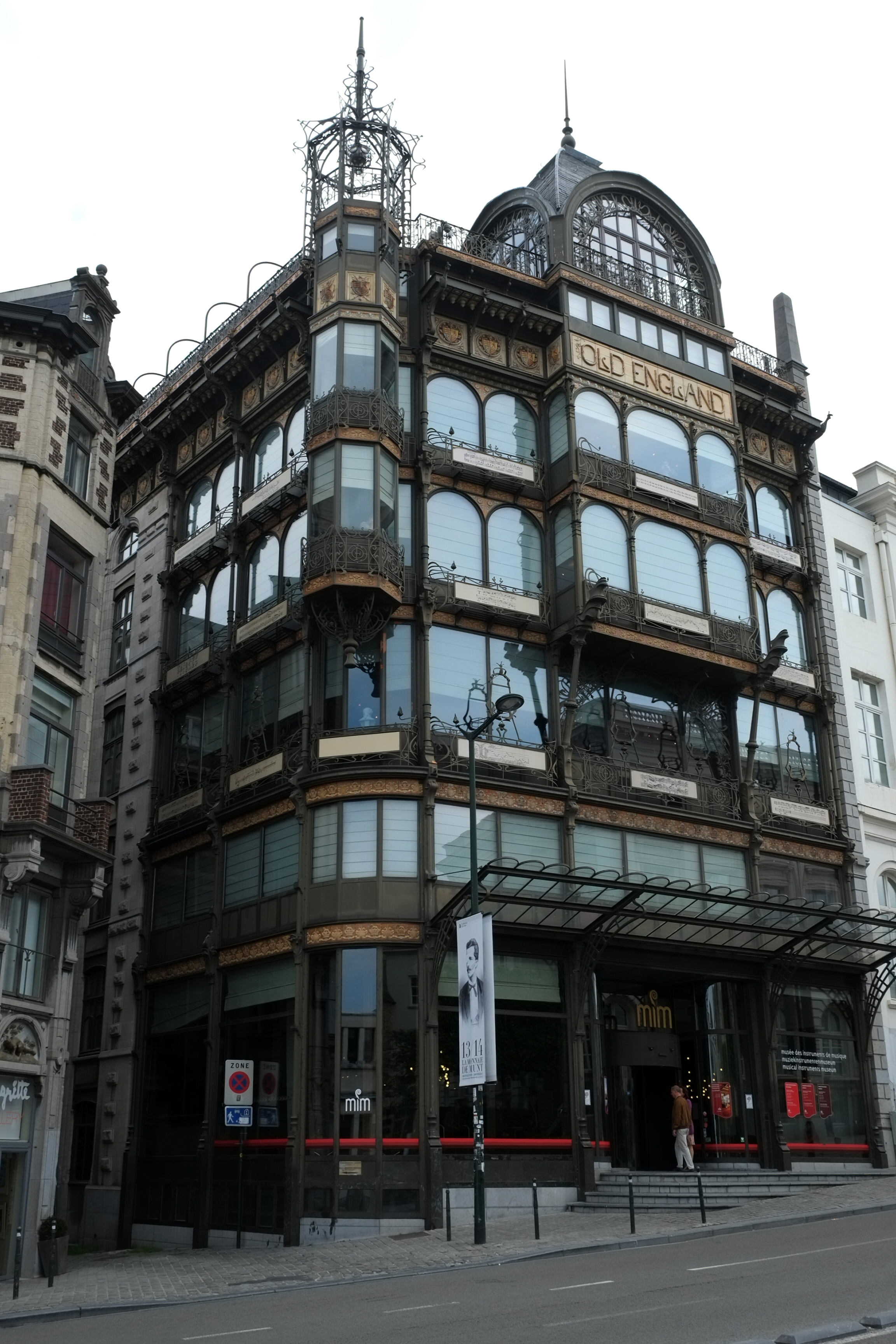 Musée des Instruments de Musique Bruxelles